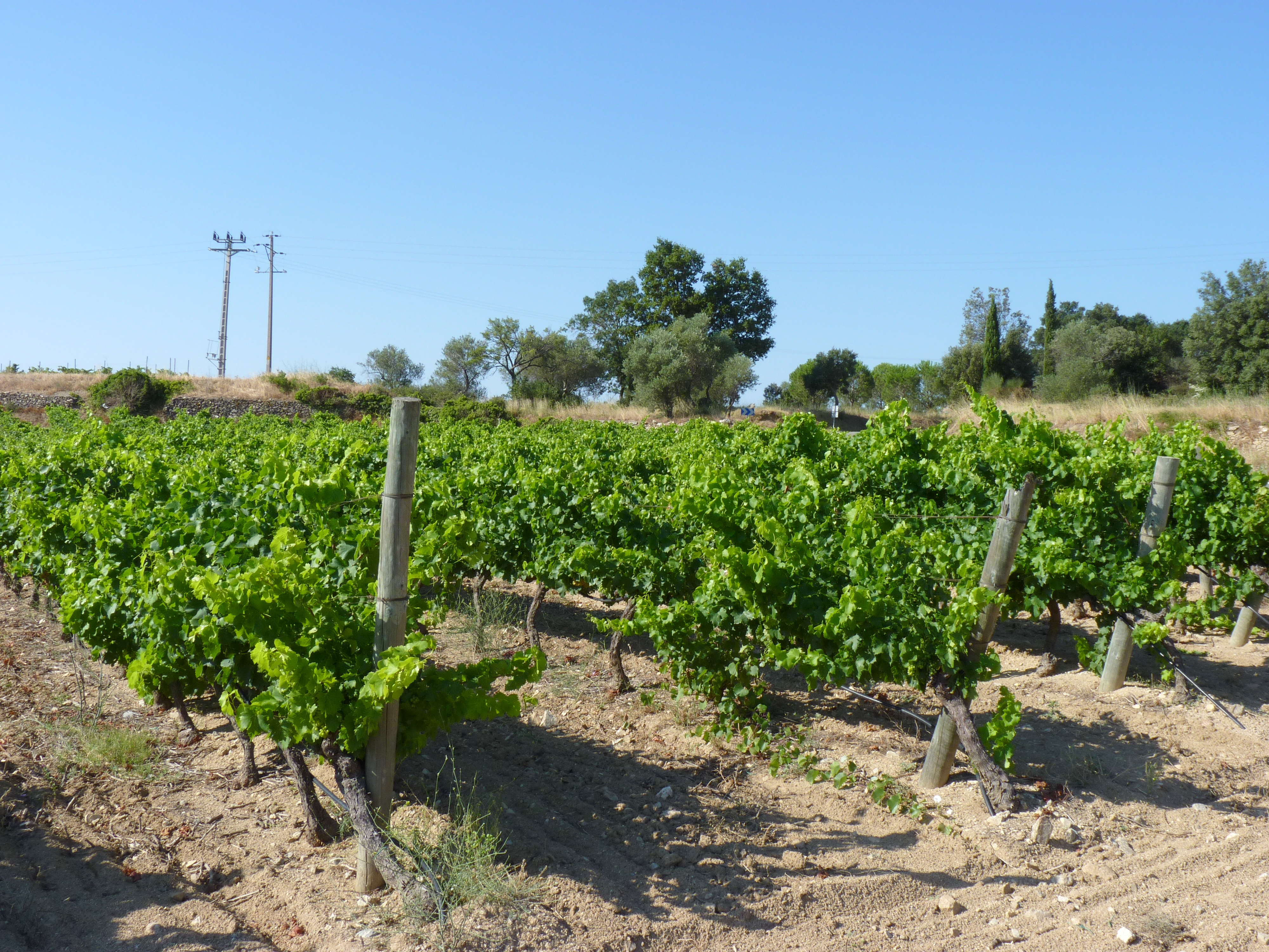 Vignoble, Capmany (Haut-Ampurdan, Gérone, Catalogne, Espagne)